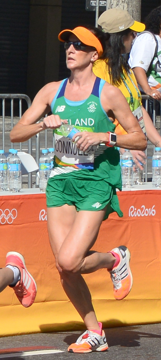 Passage du marathon des jeux olympiques de Rio 2016 dans le centre de Rio